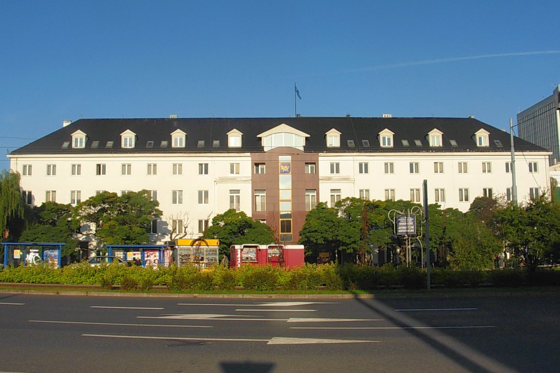 Poczta Polska. PPUP. Centralny Ośrodek Rozliczeniowy Bernardyńska 15, Bydgoszcz